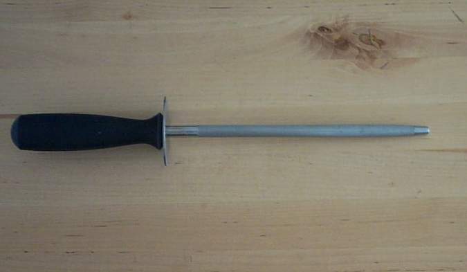 Sharpening steel